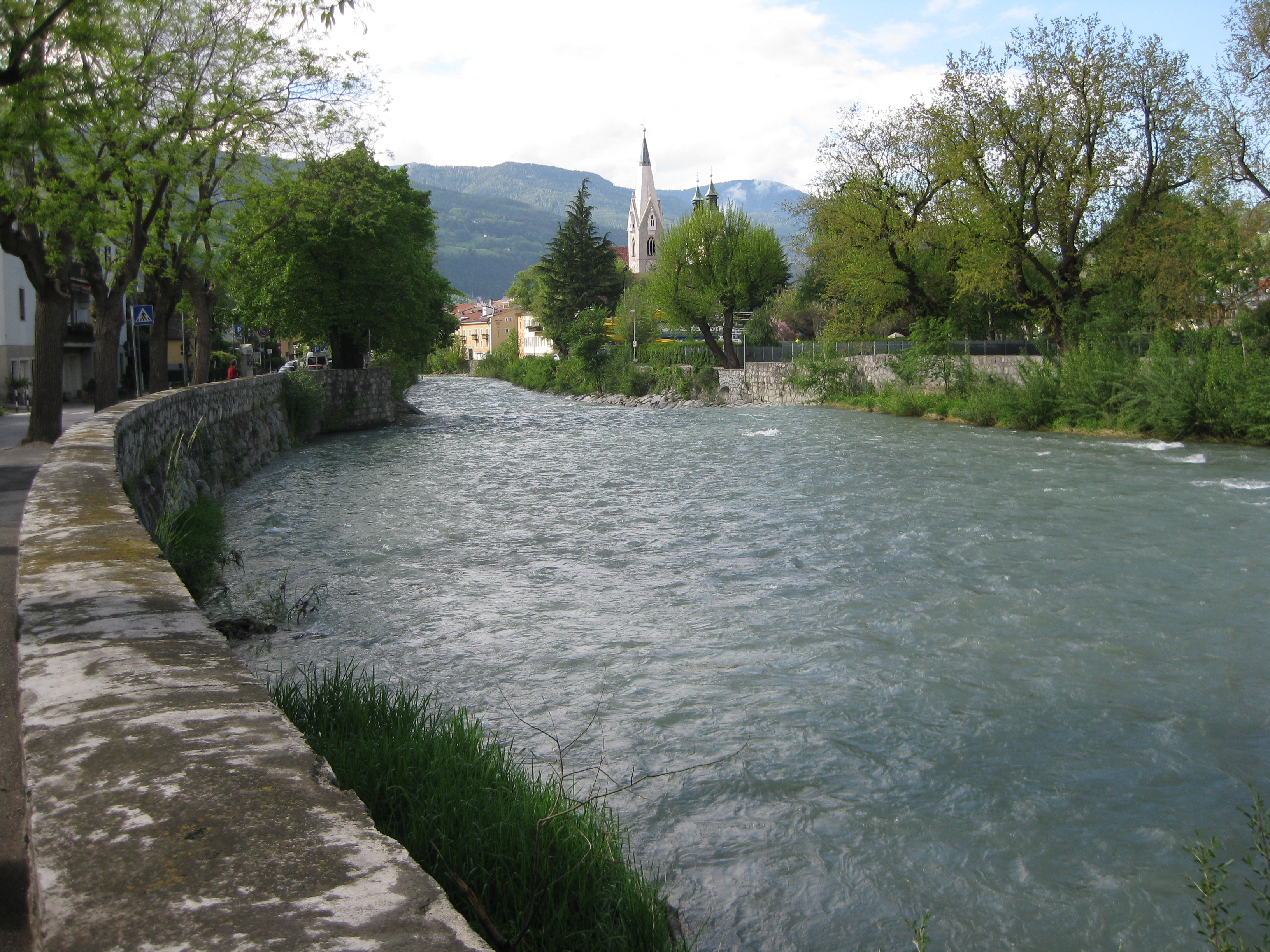 Der Eisack bei Brixen, im Hintergrund der Weiße Turm der Pfarrkirche St. Michael